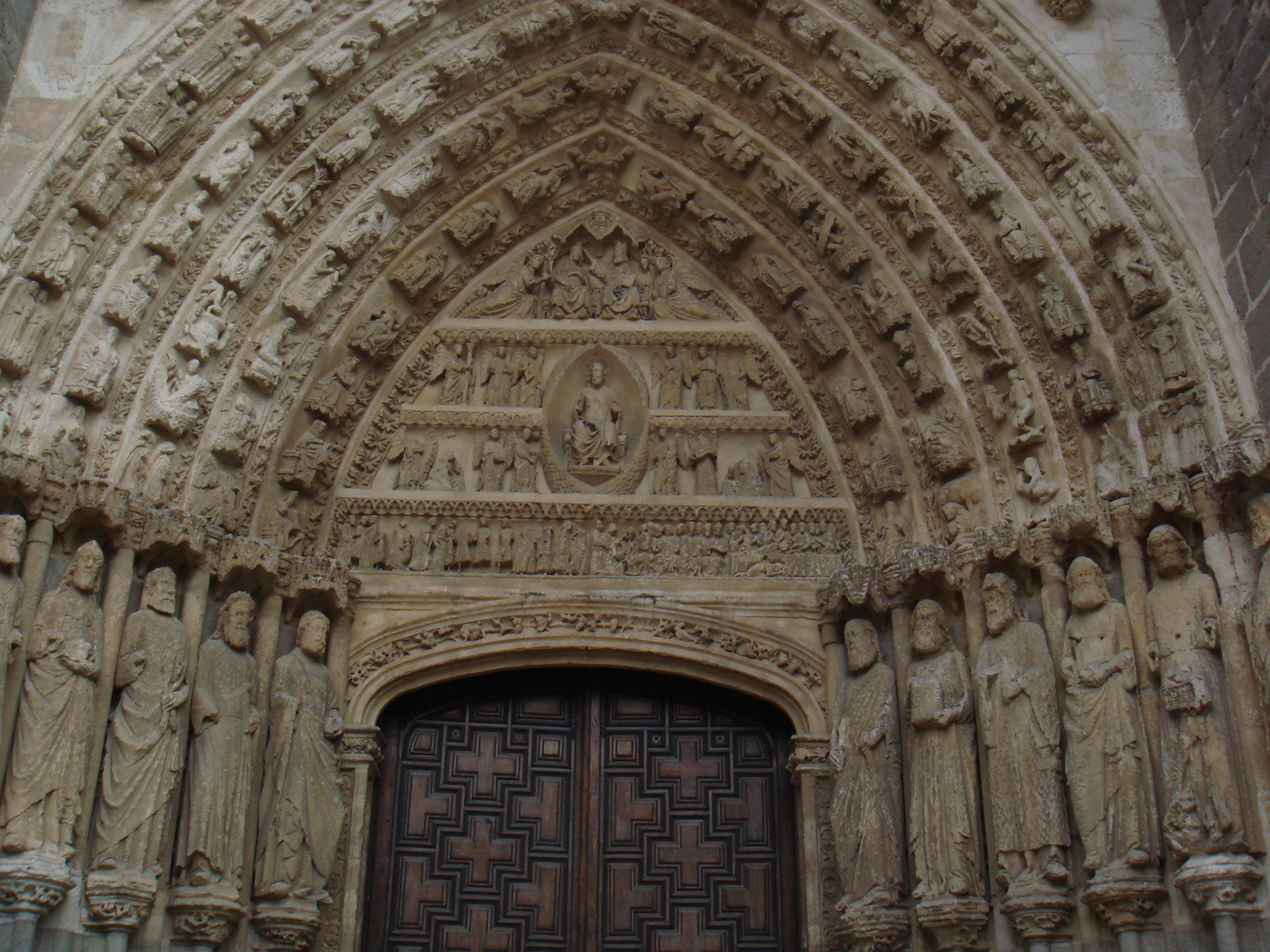 Detalle de la portada norte de la catedral de Ávila.